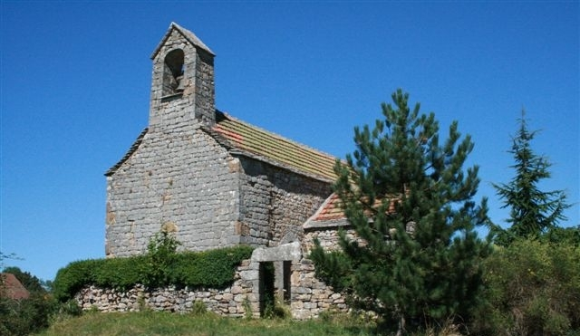 Chapelle Saint Martin de Rinhodes, commune d'Ols-et-Rinhodes (Aveyron)